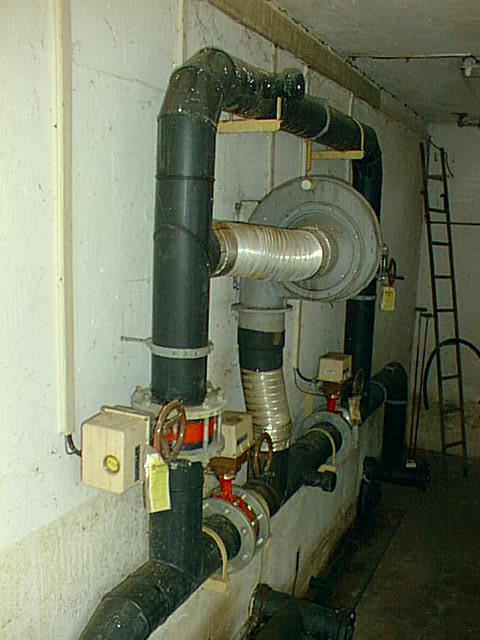 Vzduchotechnika na kompostárně v Otrokovicích Zdroj: Biom.cz, autor: Antonín Slejška